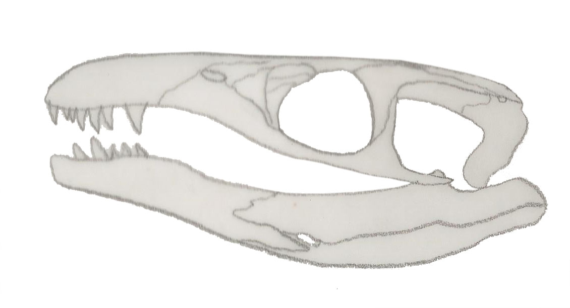 restoration of Miodentosaurus skull